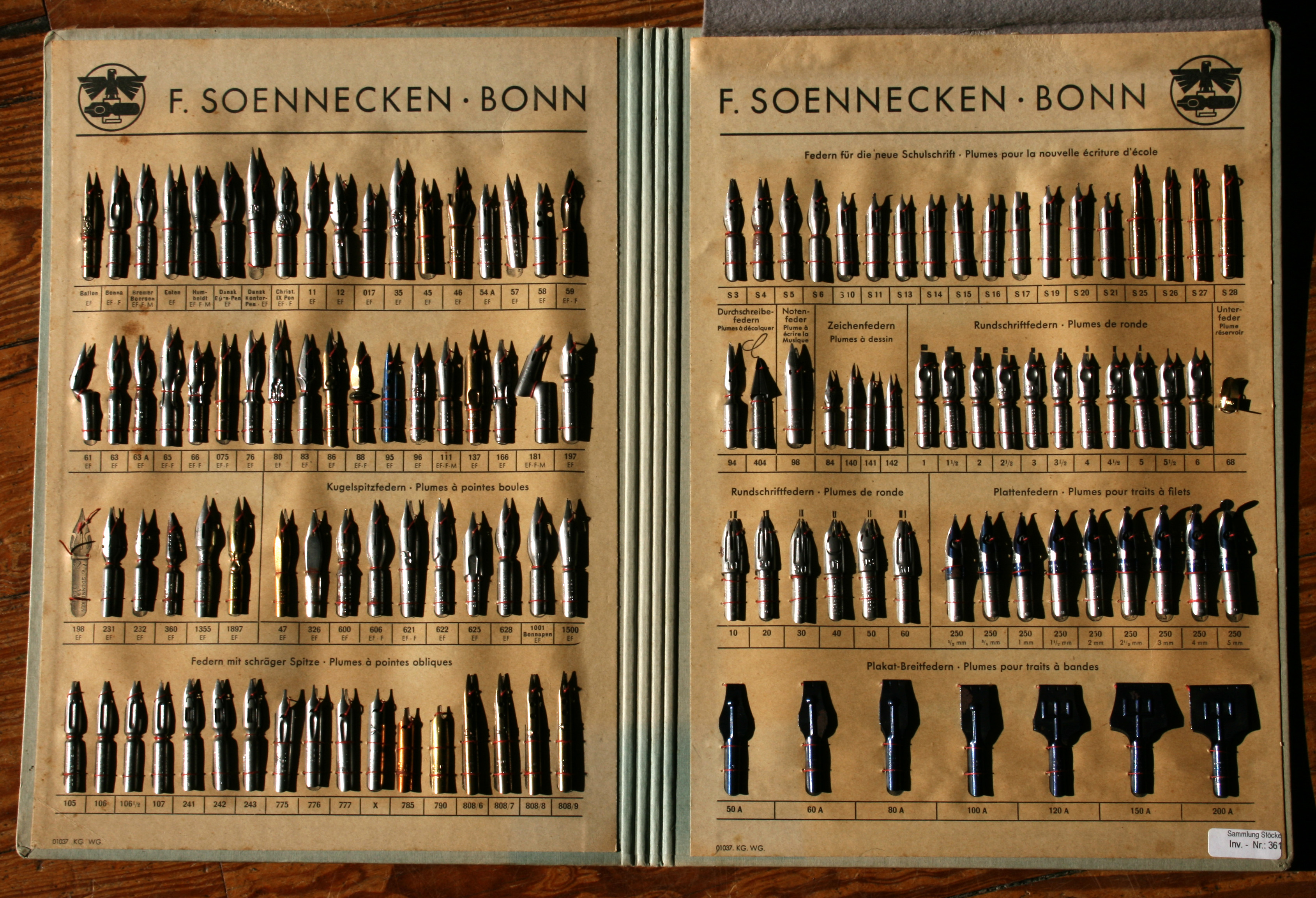 Schreibfedernsortiment des Unternehmens Soennecken von 1924